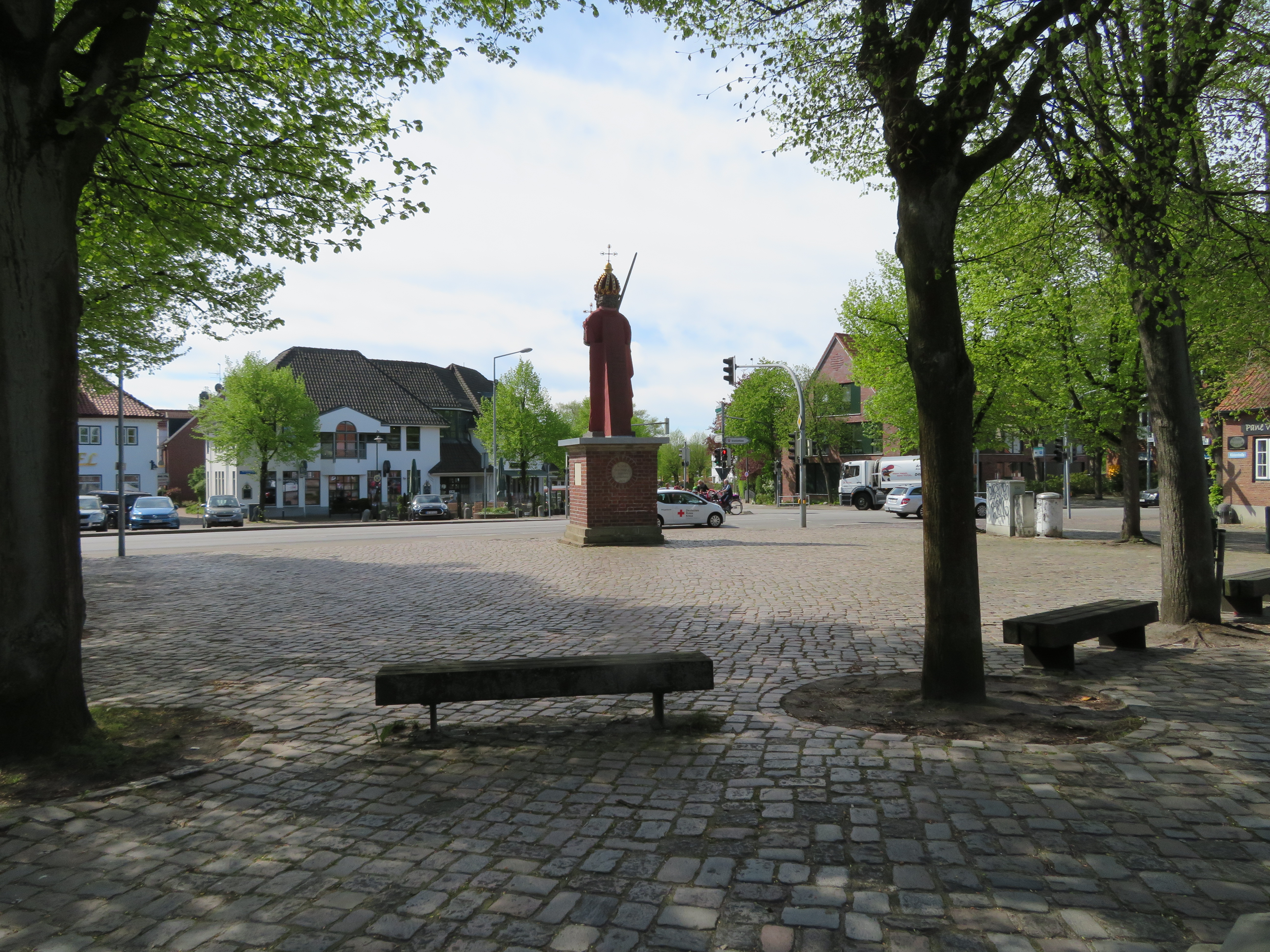 Marktplatz in Wedel, Roland